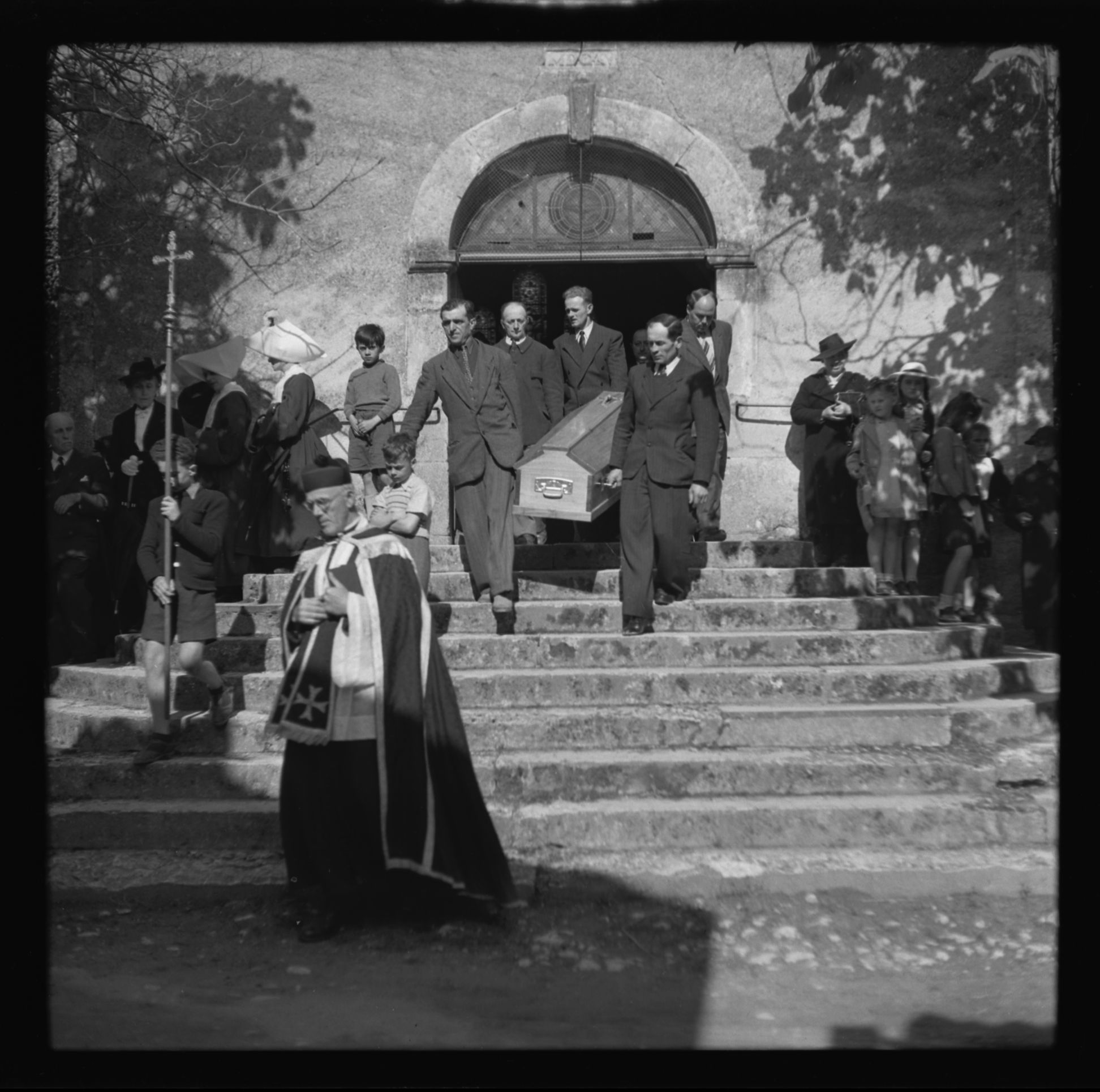 Eglise de Touzac (Lot). Juillet 1948. Vue des obsèques de Marguerite Moréno à l'église de Touzac.